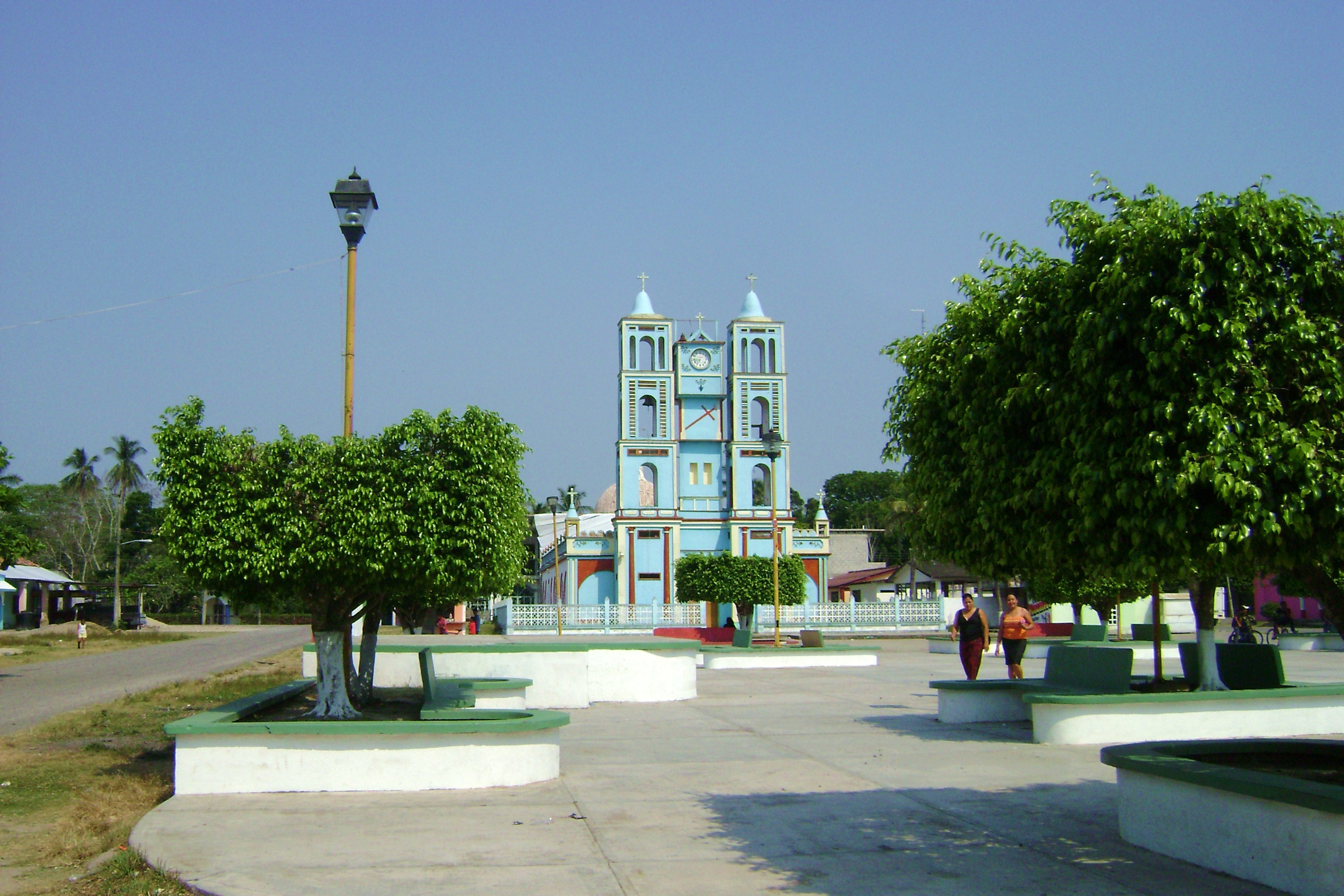 Iglesia de San Mateo, en la comunidad de Mecoacán, Jalpa de Méndez, Tabasco